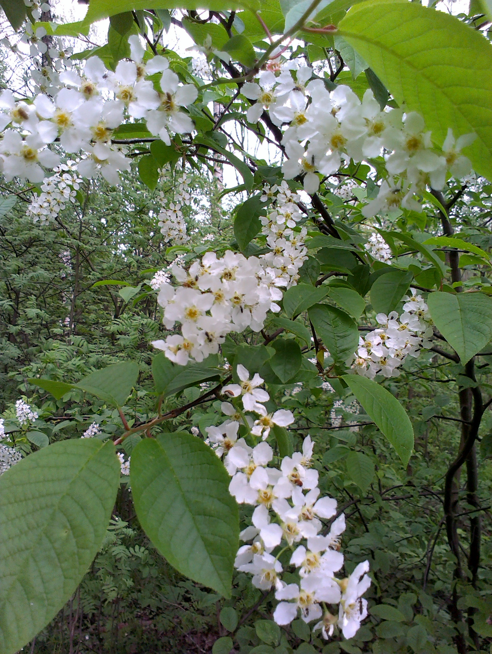 czeremcha zwyczajna